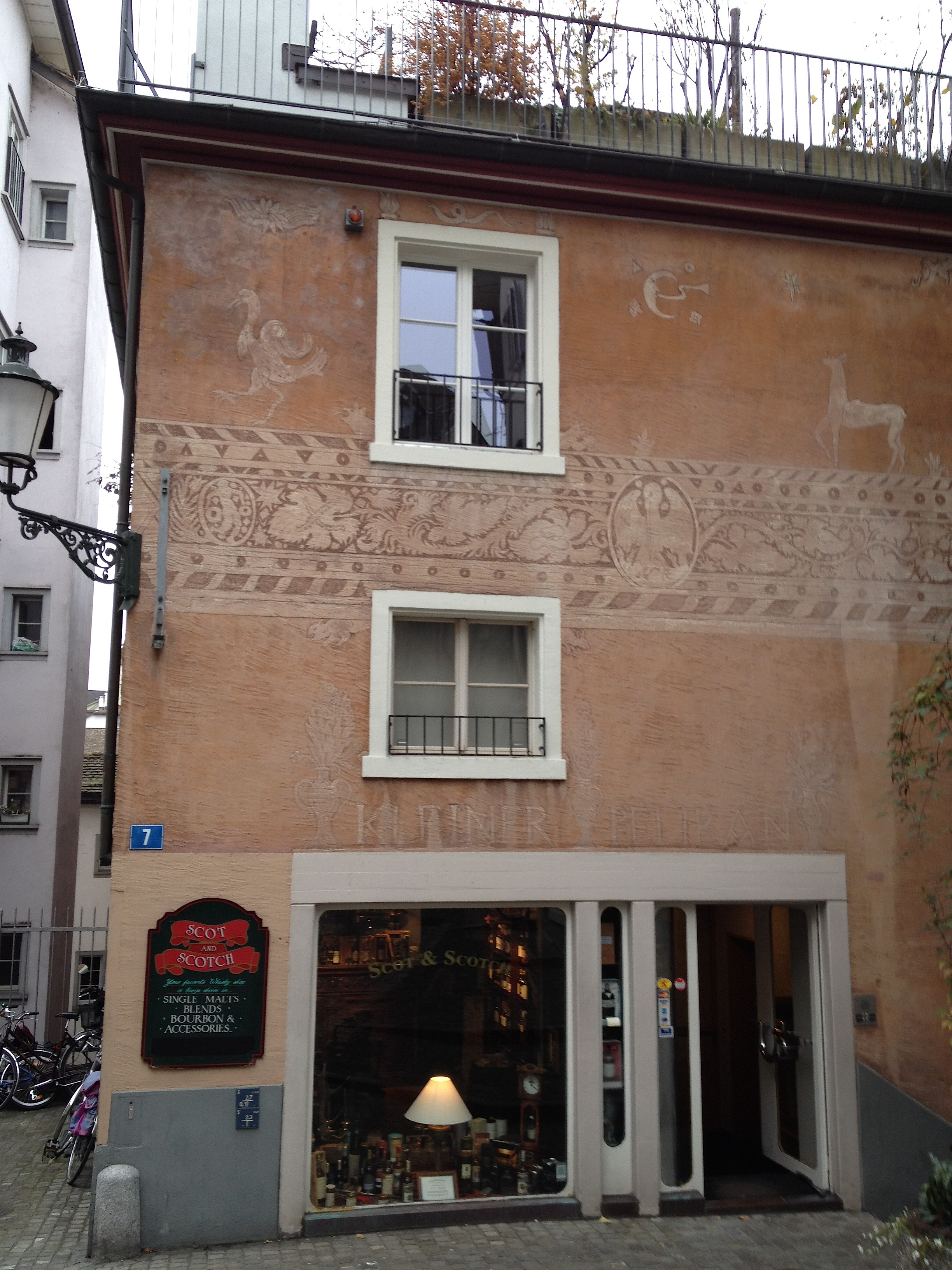 Haus zum kleinen Pelikan, Zürich. Sgraffiti von Steivan Liun Könz Haus zum kleinen Pelikan, Ostseite